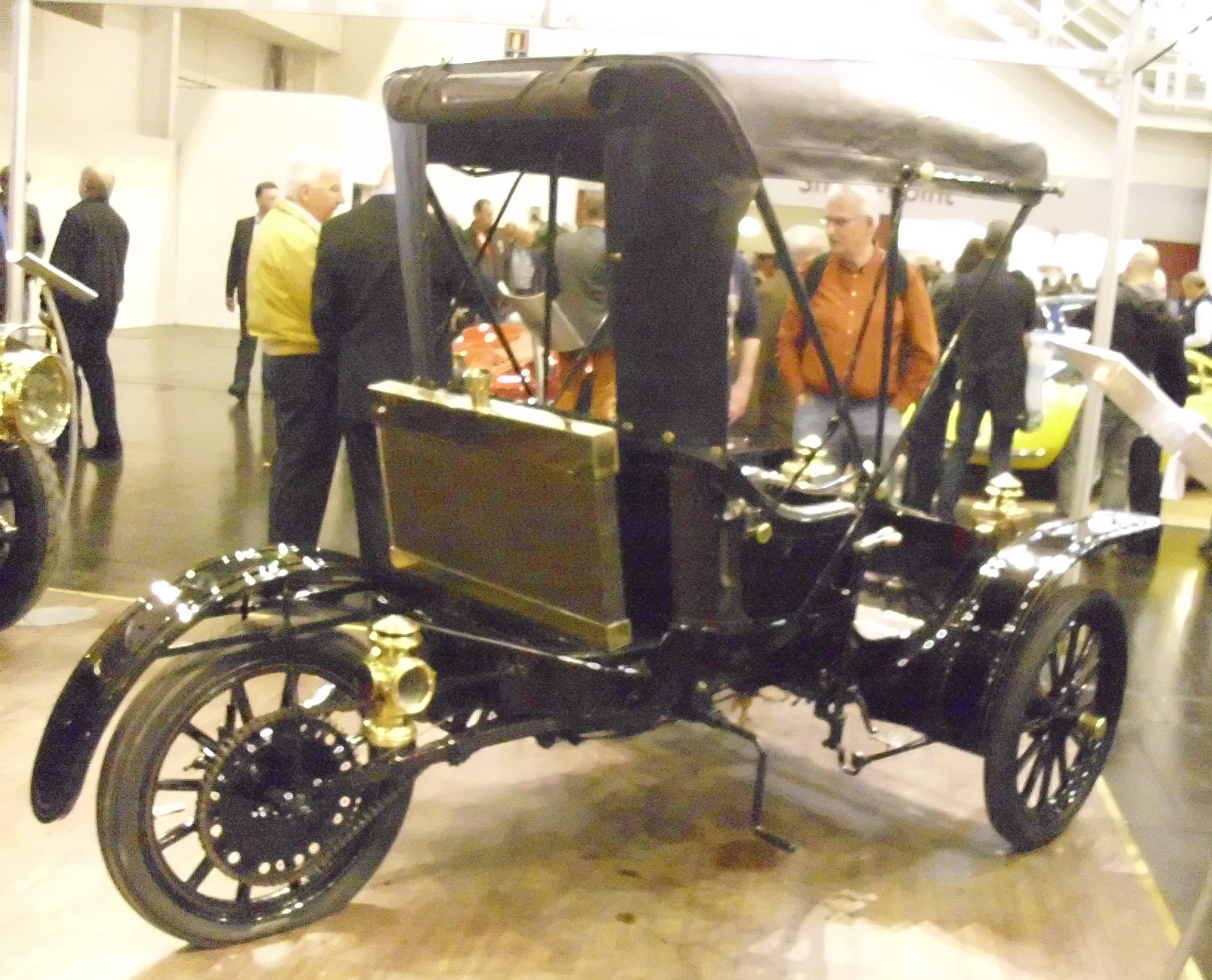 Motorette 10 HP 1911